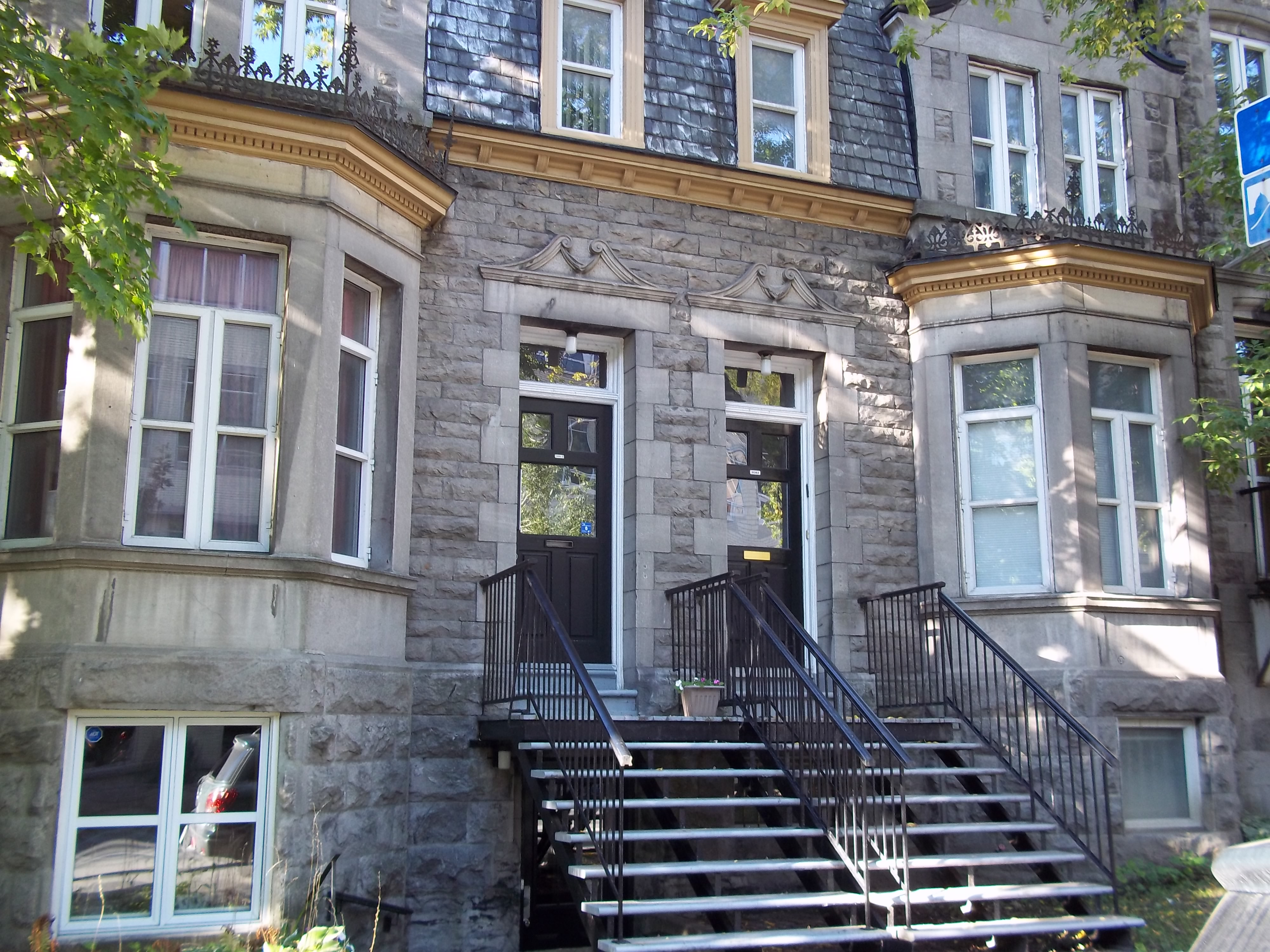 Maisons Charles-Sheppard. À gauche, celle du 2080A-2080B, rue Jeanne-Mance. À droite, celle du 2082, rue Jeanne-Mance, Montréal.